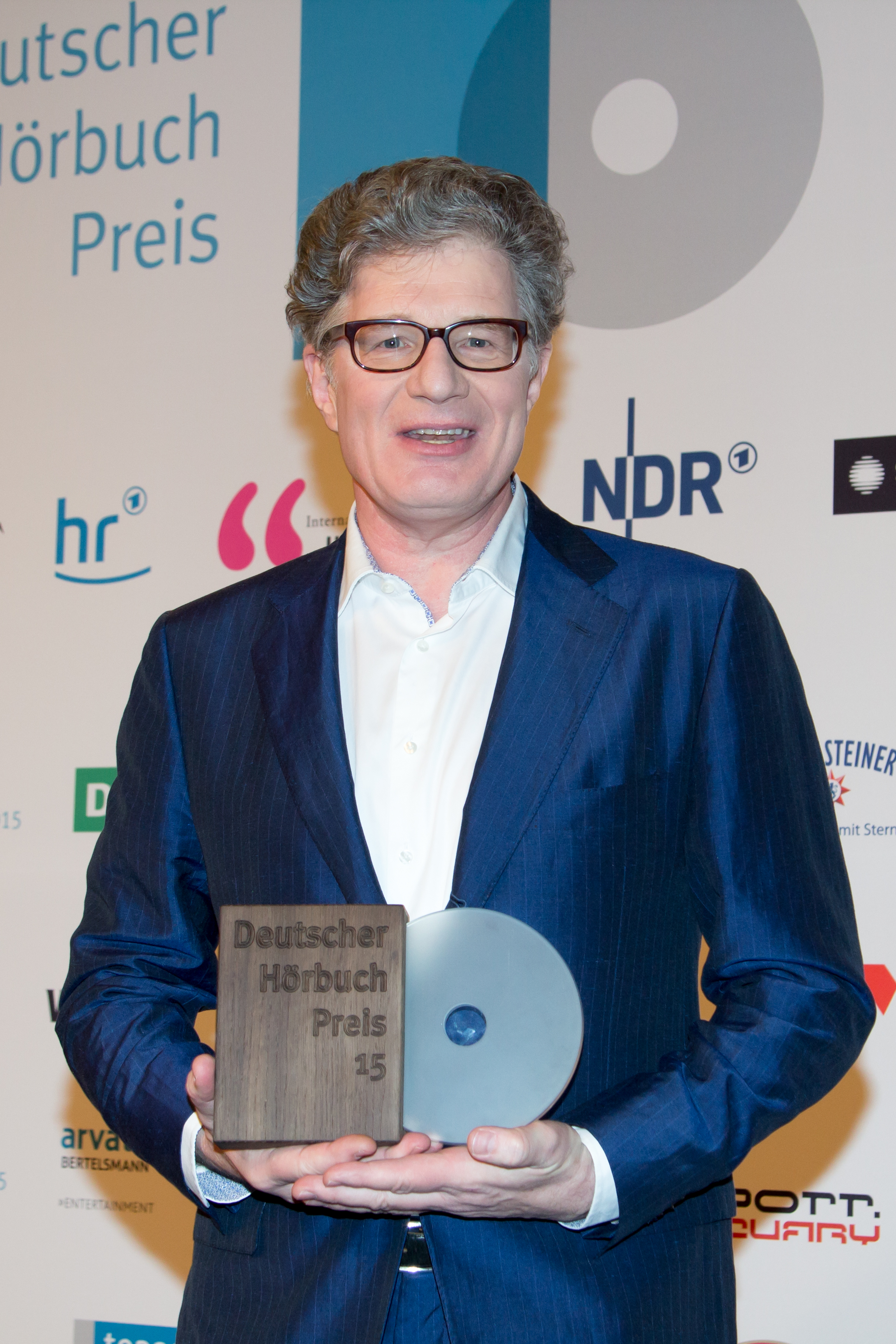 Deutscher Hörbuchpreis 2015; Roger Willemsen Preis für das beste Sachhörbuch